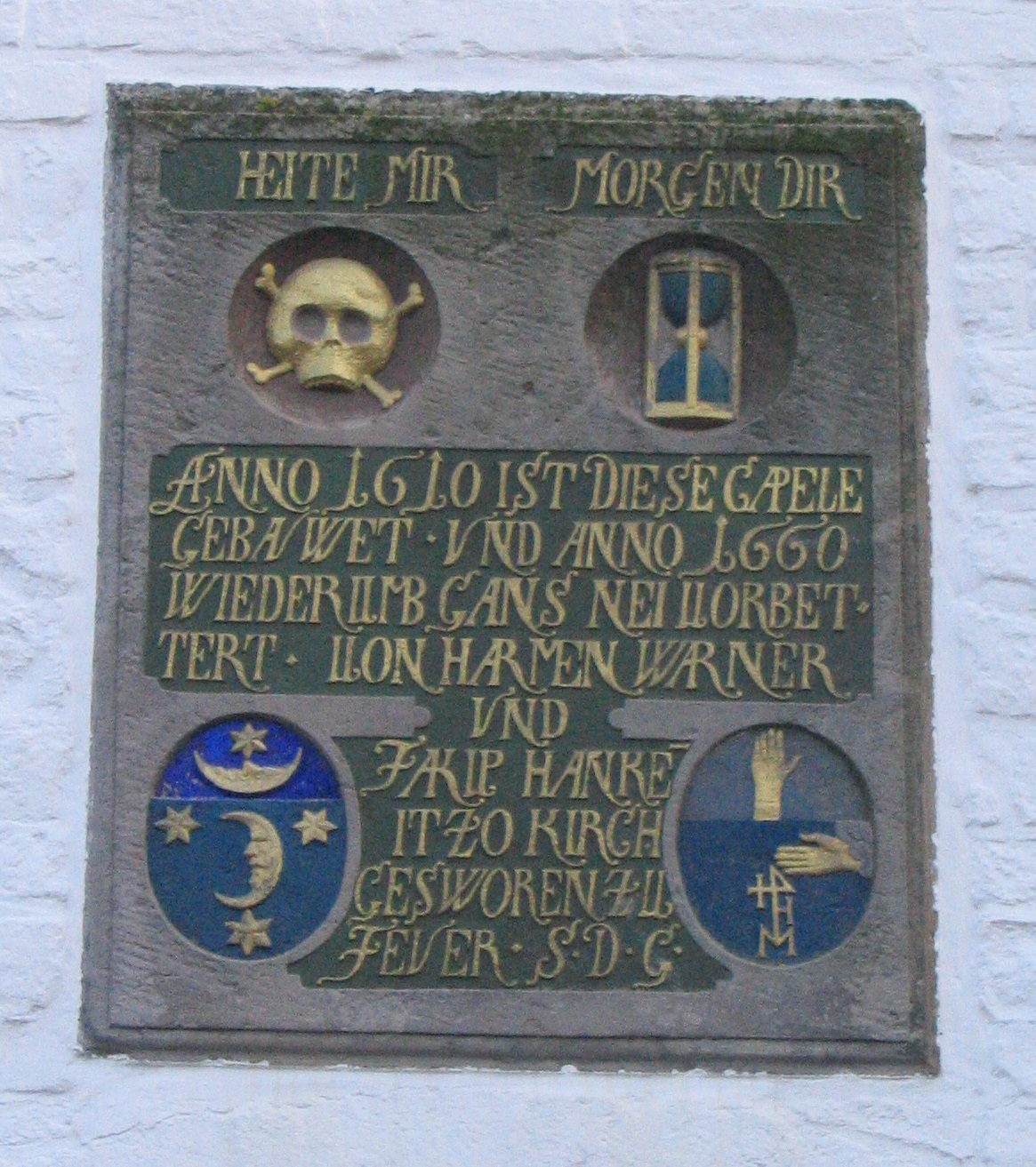 Sandsteintafel über der Eingangstür der St.-Annen-Kapelle.